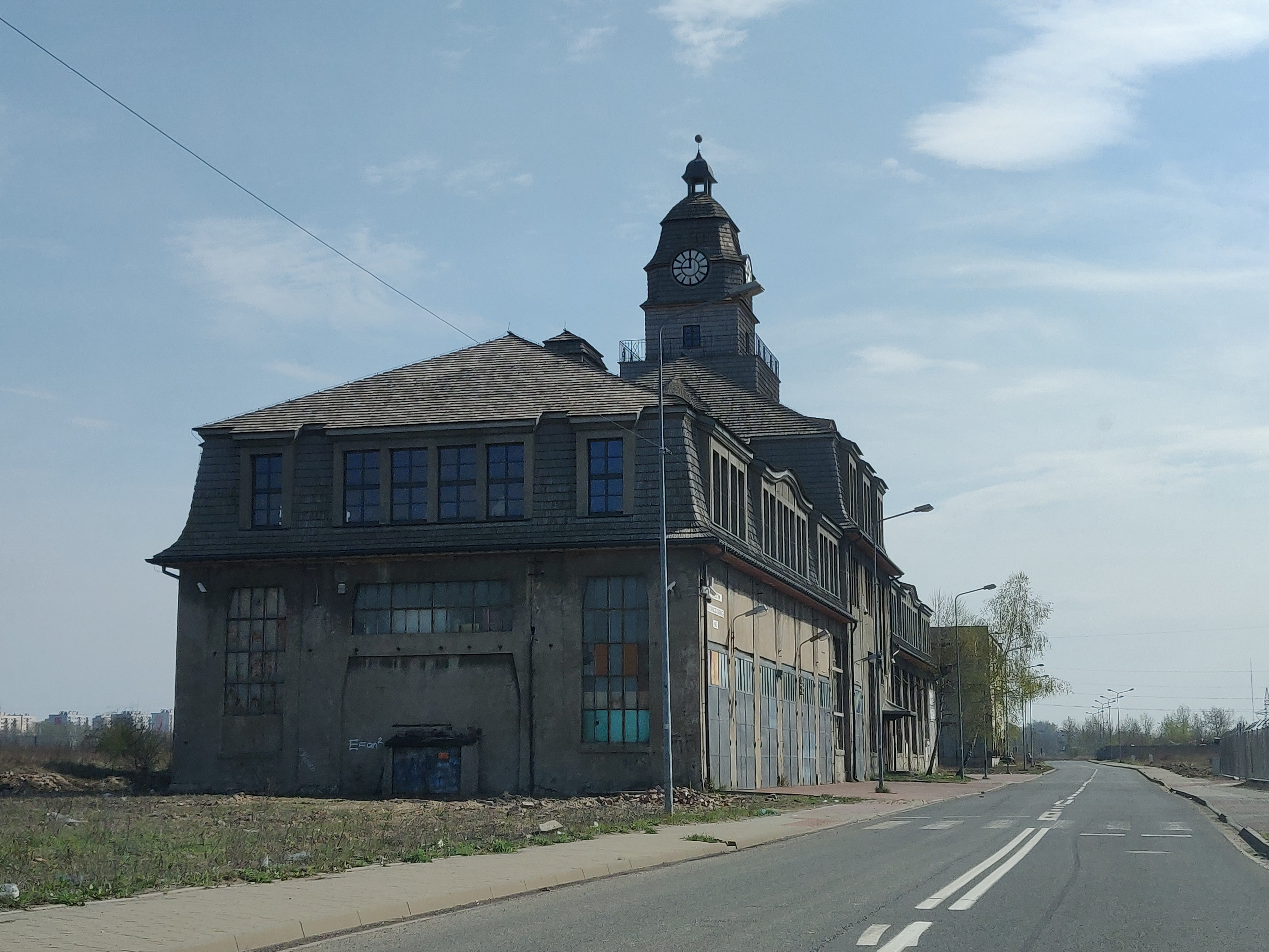 Katowice - HMN Szopienice - huta